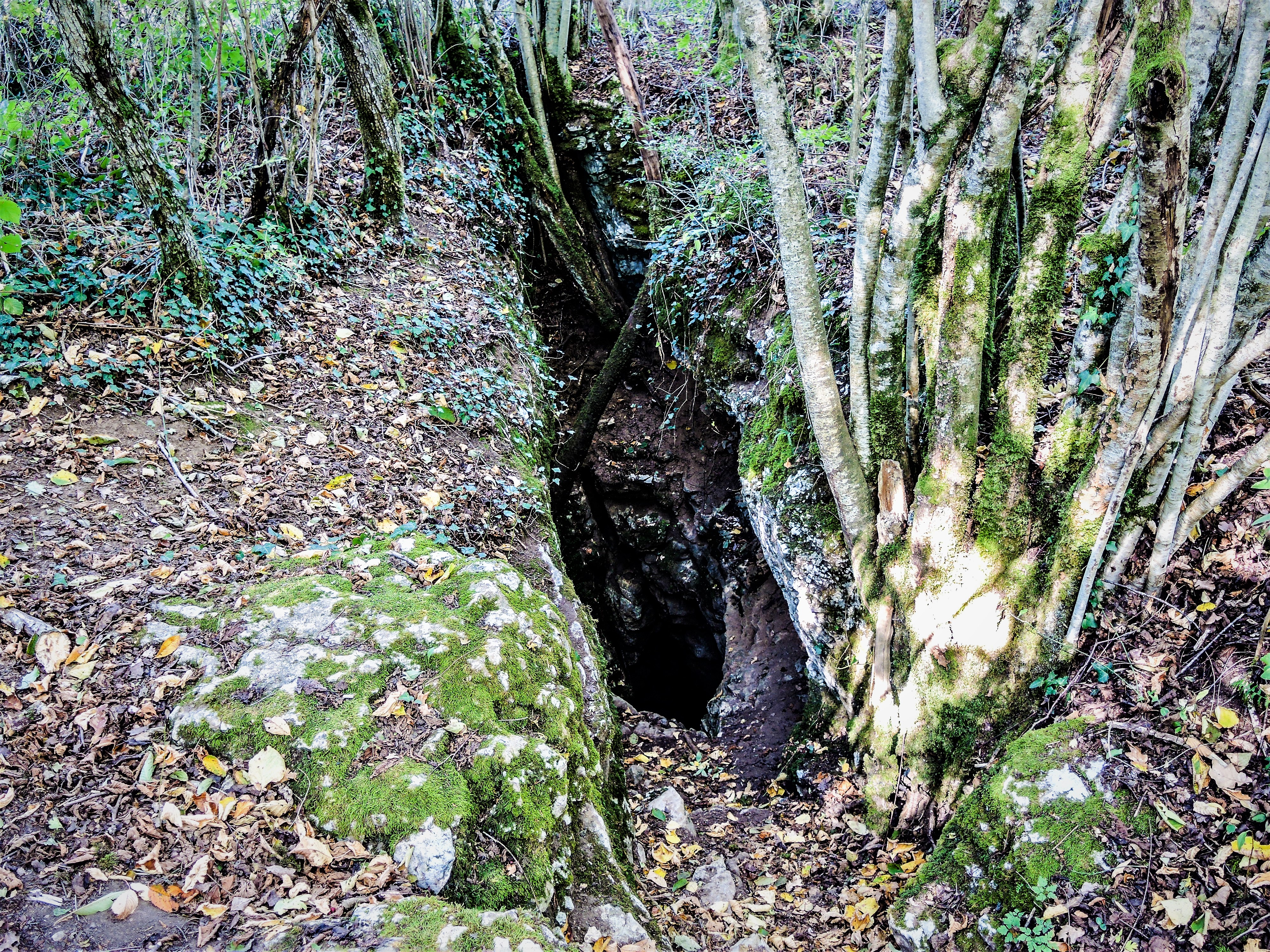 Entrée, verticale, de la grotte des Orcières. Montivernage. Doubs